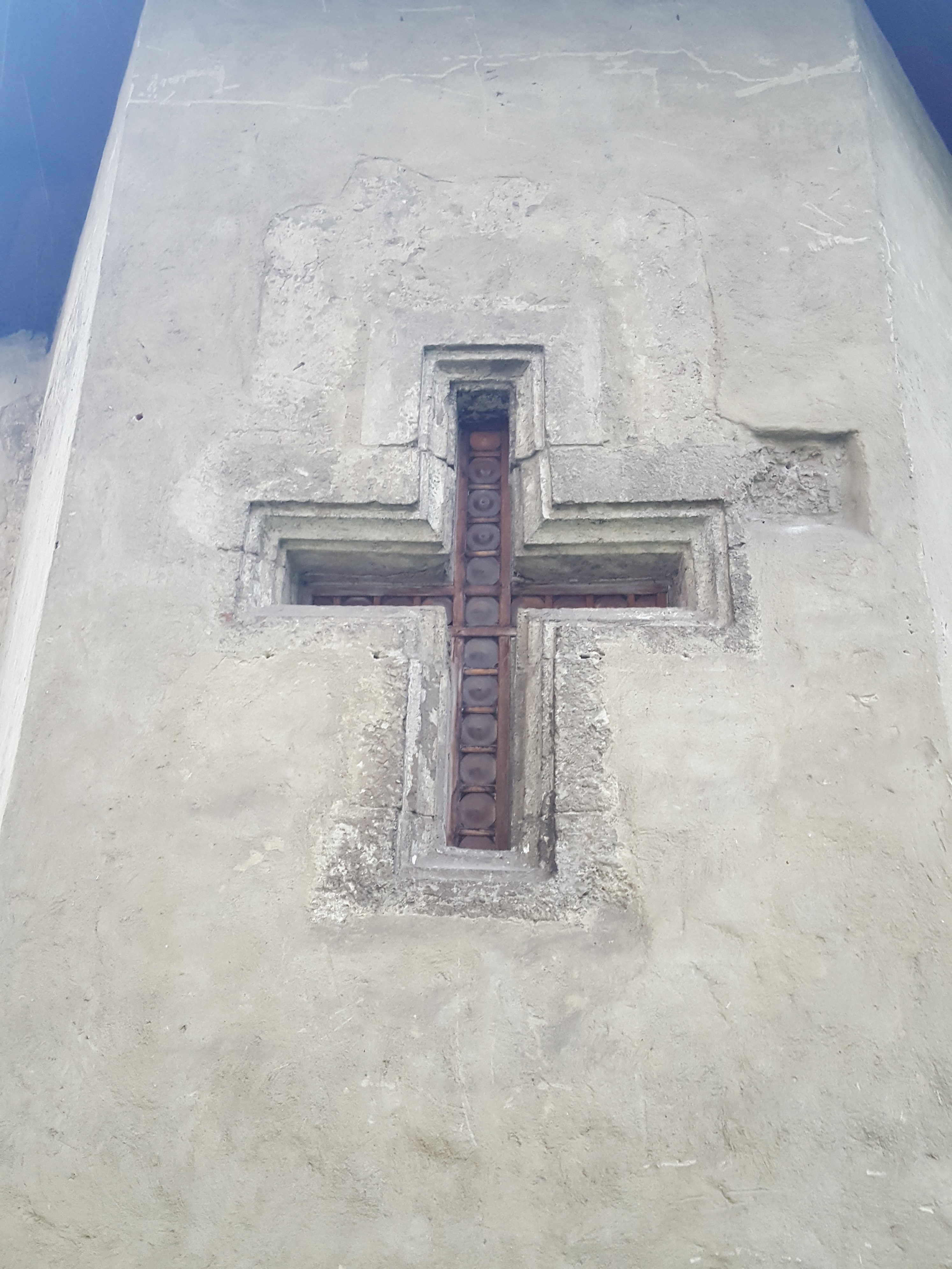 Gotyckie obramienie krzyżowego okna na osi, które jest charakterystyczne dla zaawansowanej fazy gotyku z XIV wieku.